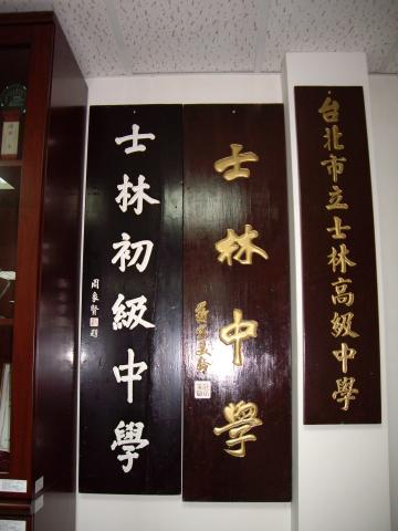 中文（台灣）: 臺北市立中正高級中學名稱流變。